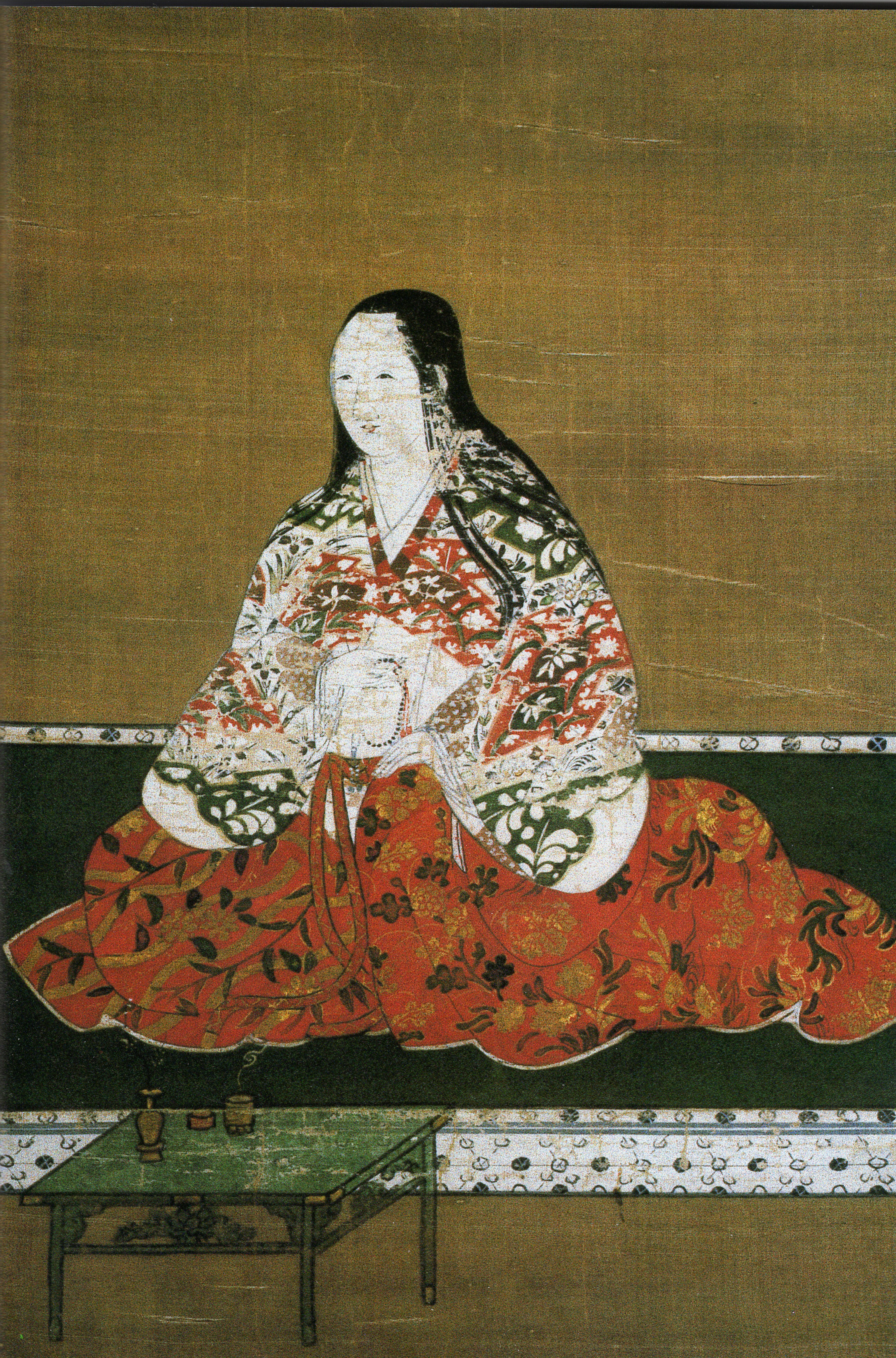 満天姫(松平康元の女、はじめ福島正之の正室、のちに津軽信枚の正室)の肖像。